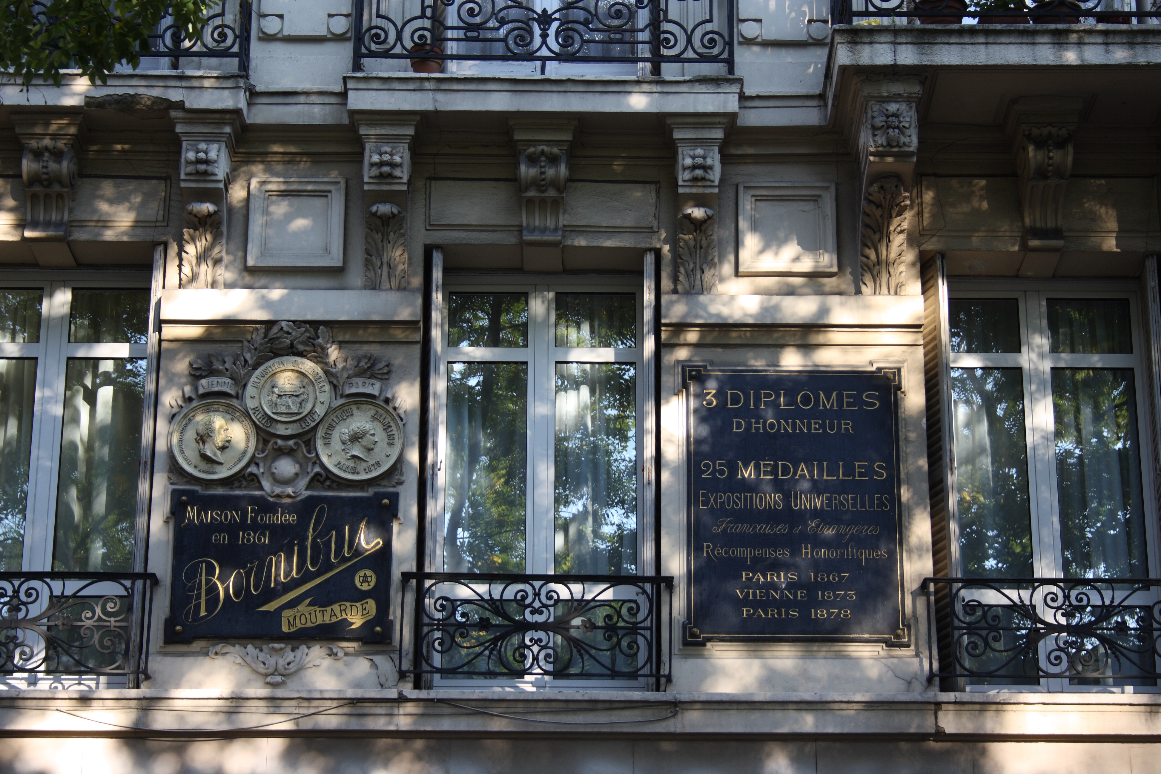 58 Boulevard de la Villette in Paris (19. Arrondissement), Moutarde Bornibus